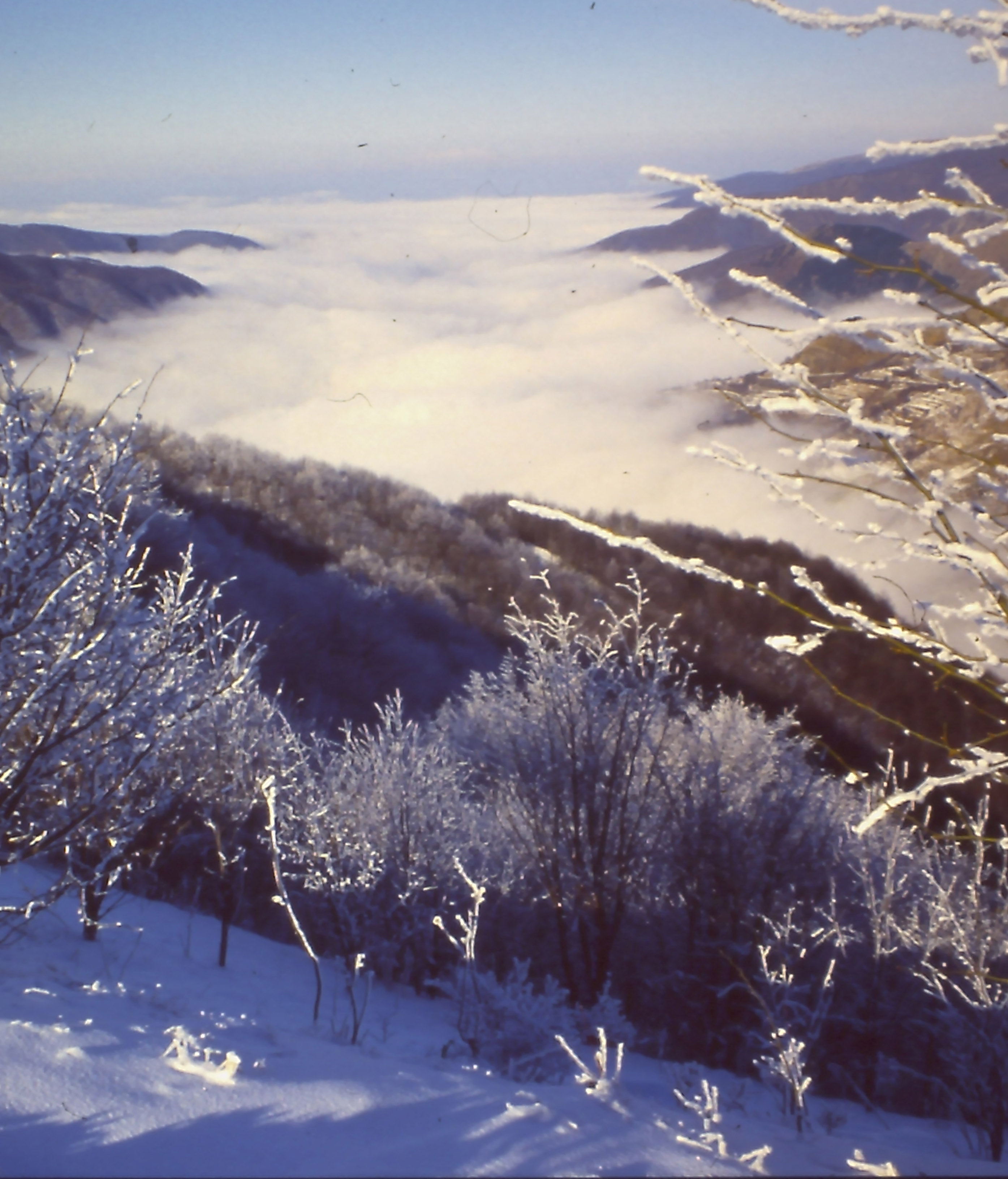 La Valle Borbera coperta da nubi vista dalla vetta del Monte Antola d'inverno